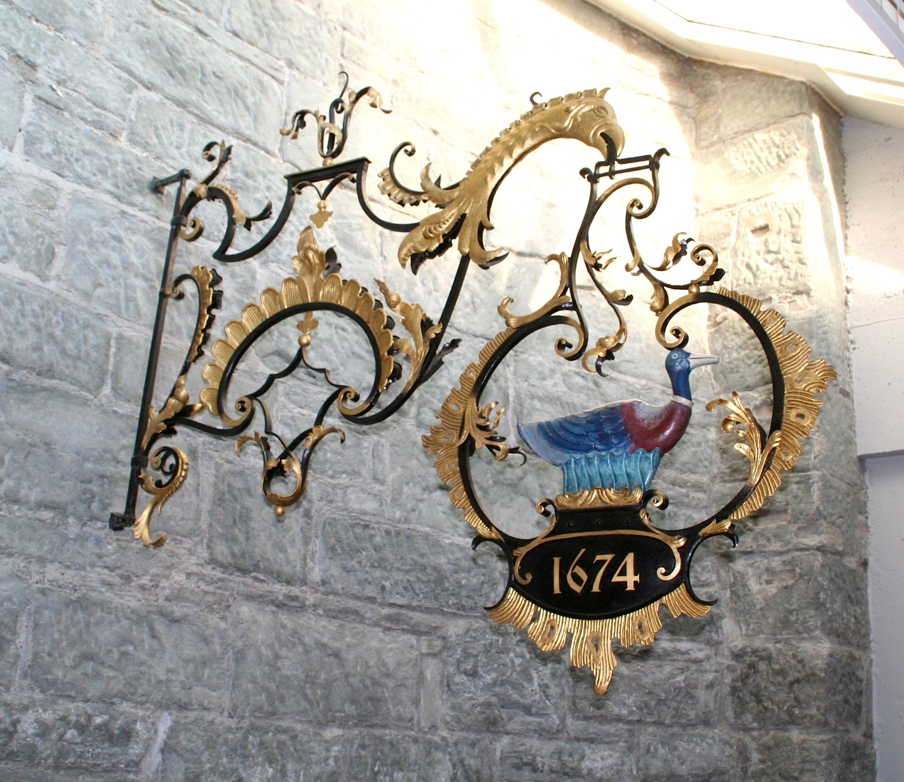 Schild im Restaurant Blaue Ente in Zürich; Kopie des Originalschildes von 1674